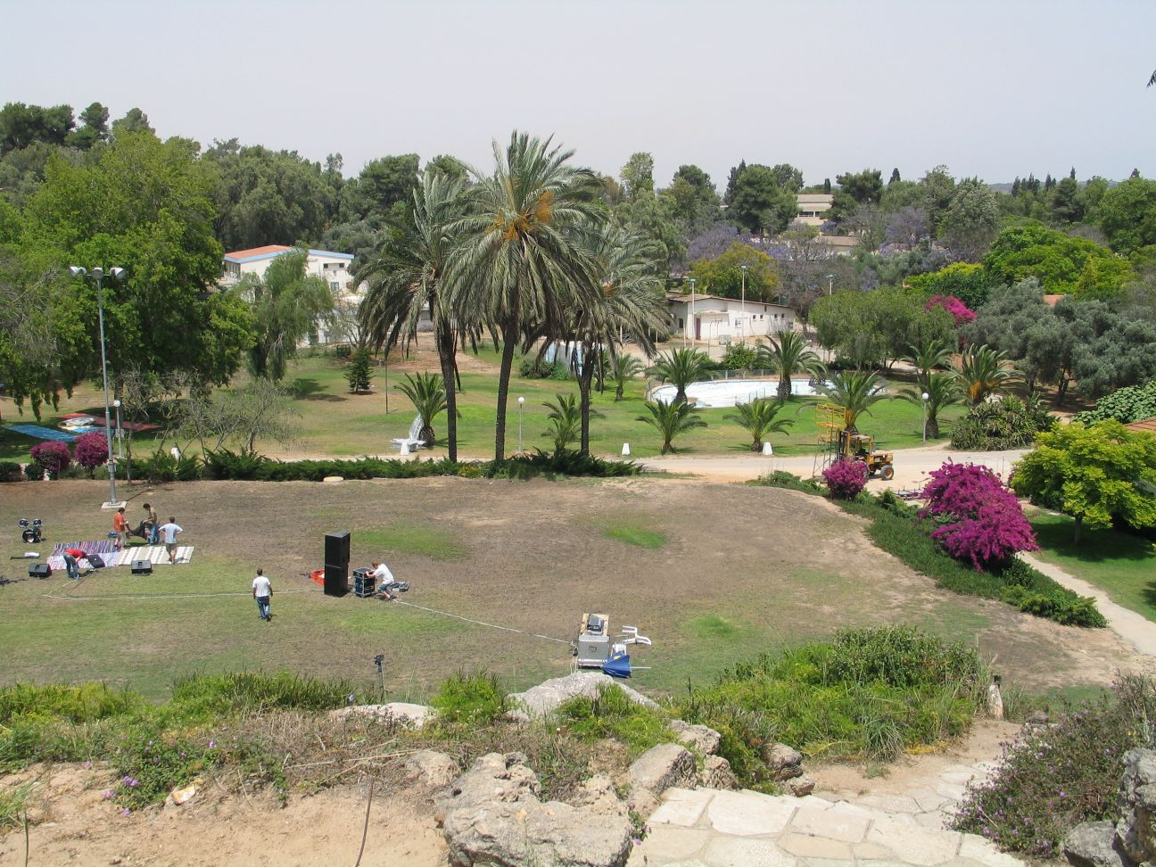 Kibbutz Yad Mordechai.